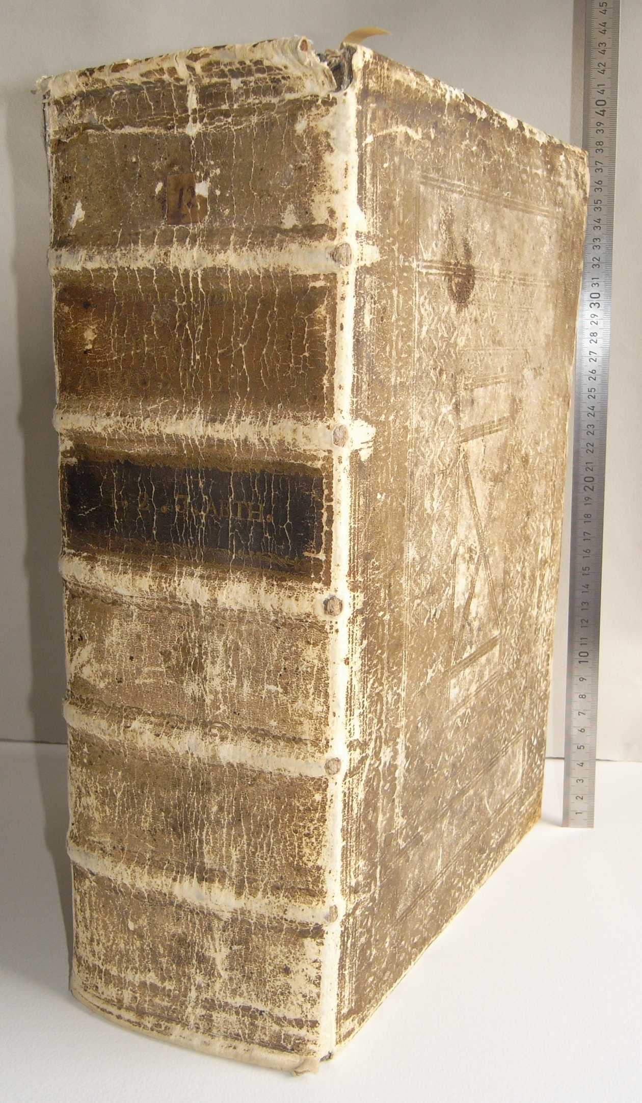 Foliant, 1806, Schweinsleder und Blindprägung